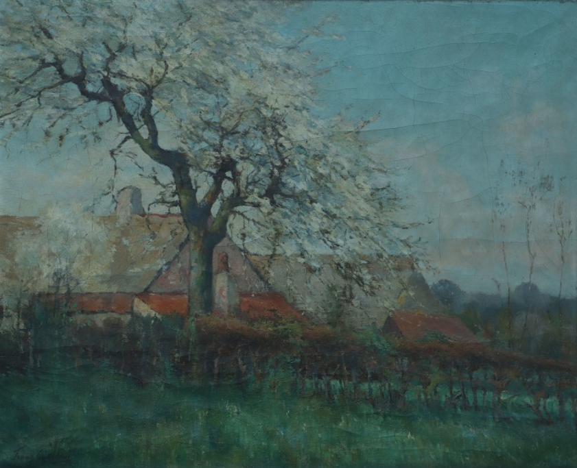 Bloeiende kerselaar van Franz Callebaut, 1909